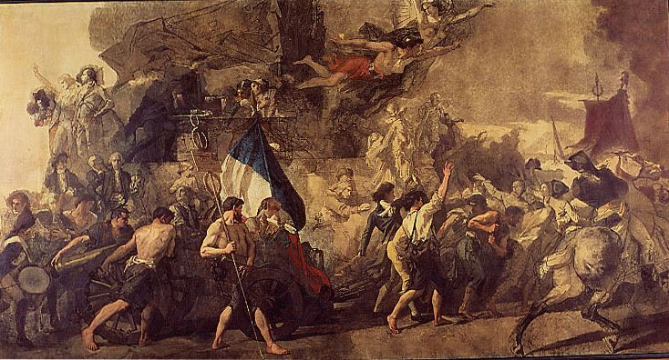 L'Enrôlement des Volontaires de 1792label QS:Lfr,"L'Enrôlement des Volontaires de 1792" Joconde database: entry 000PE026632